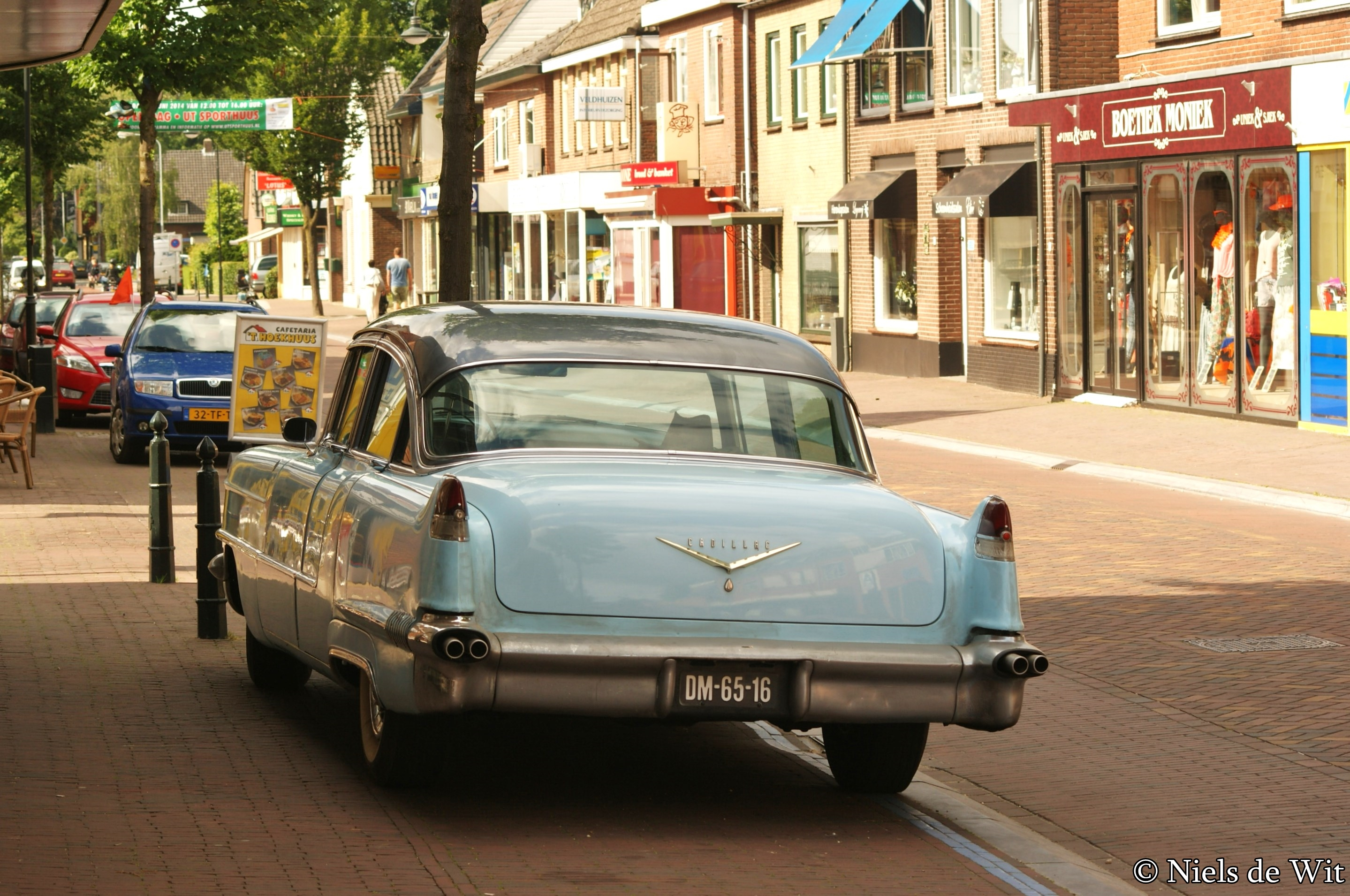 DM-65-16